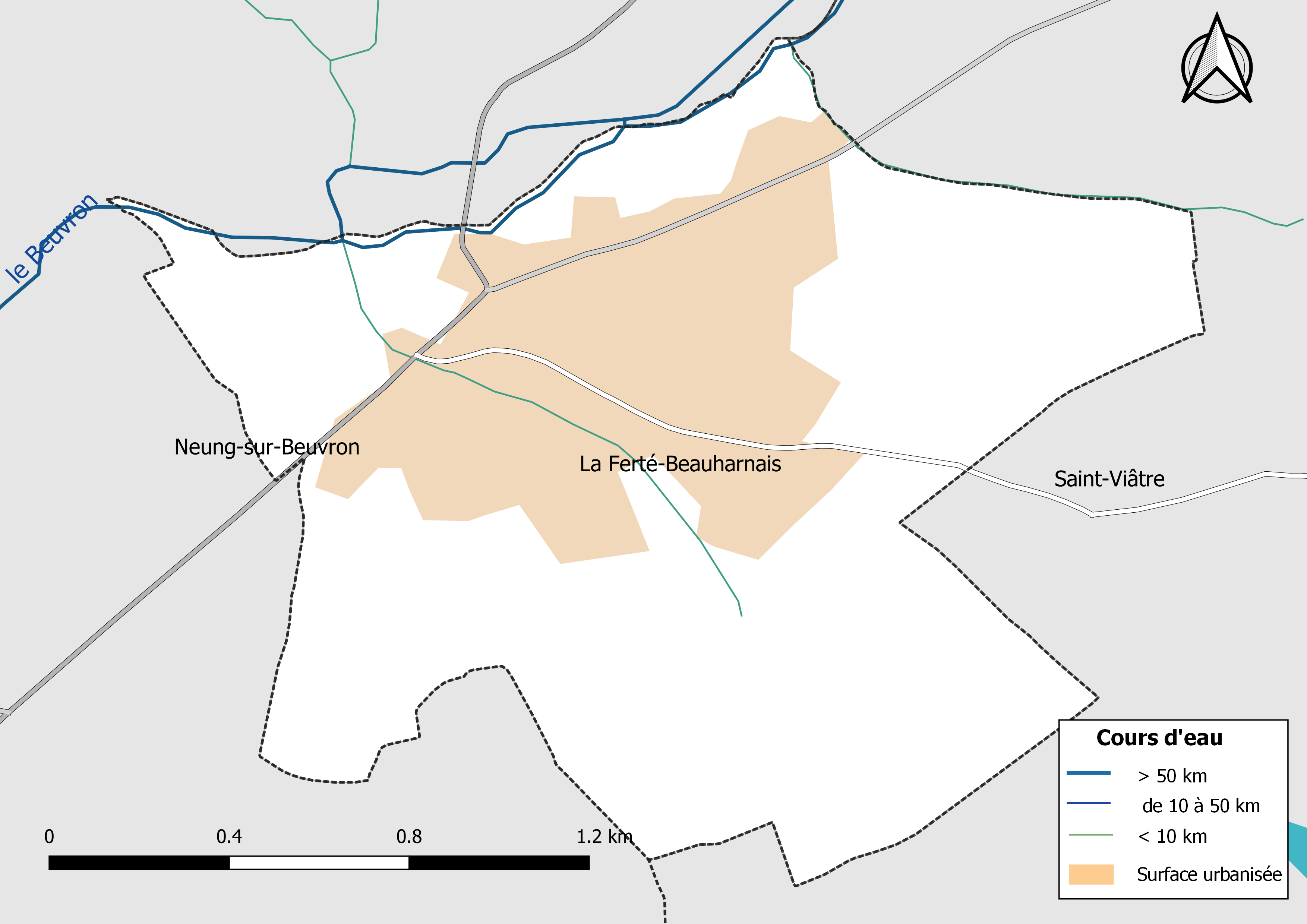 Carte du réseau hydrographique de la commune de La Ferté-Beauharnais (Loir-et-Cher, France).